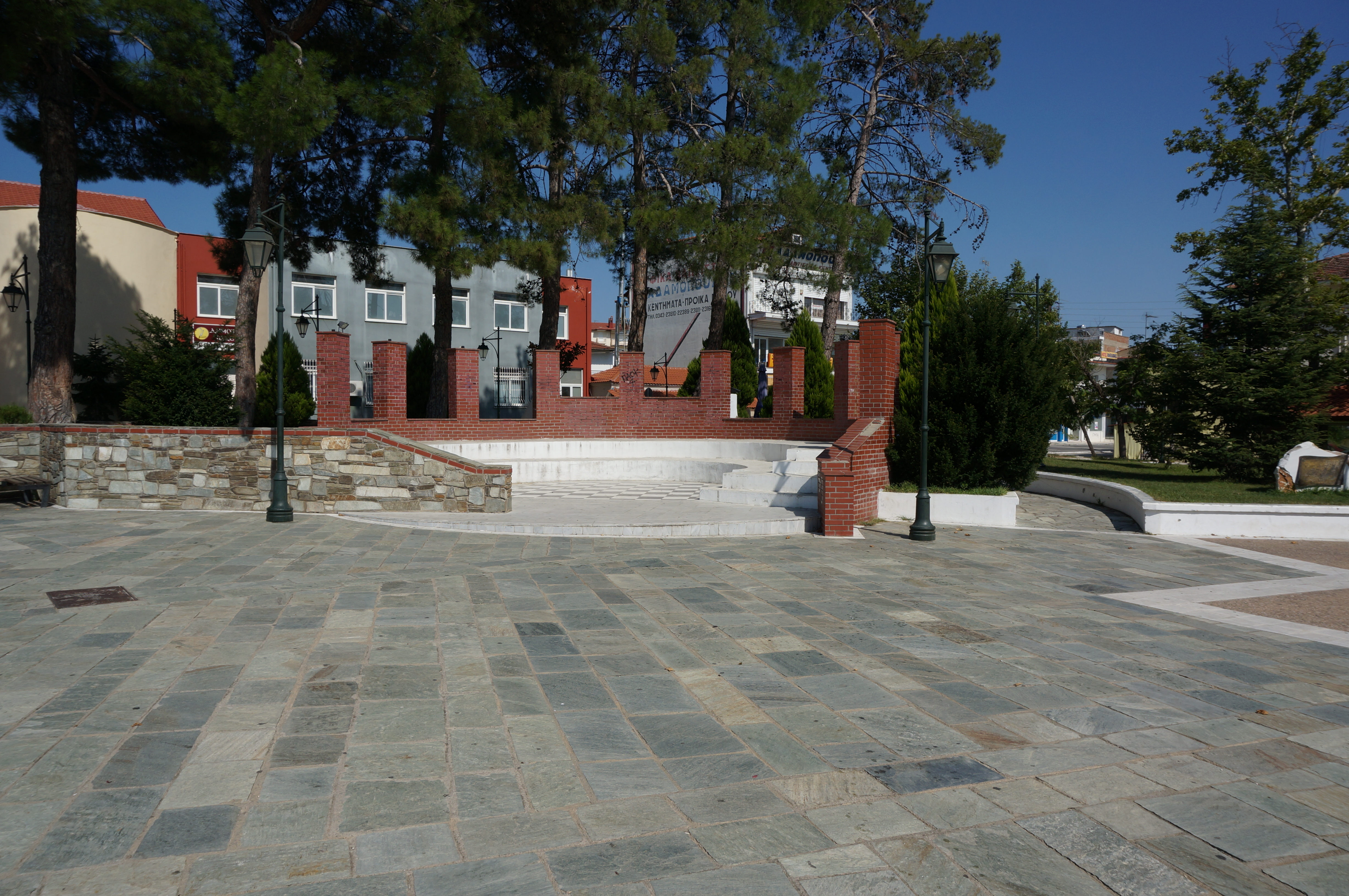 à Polycastro.